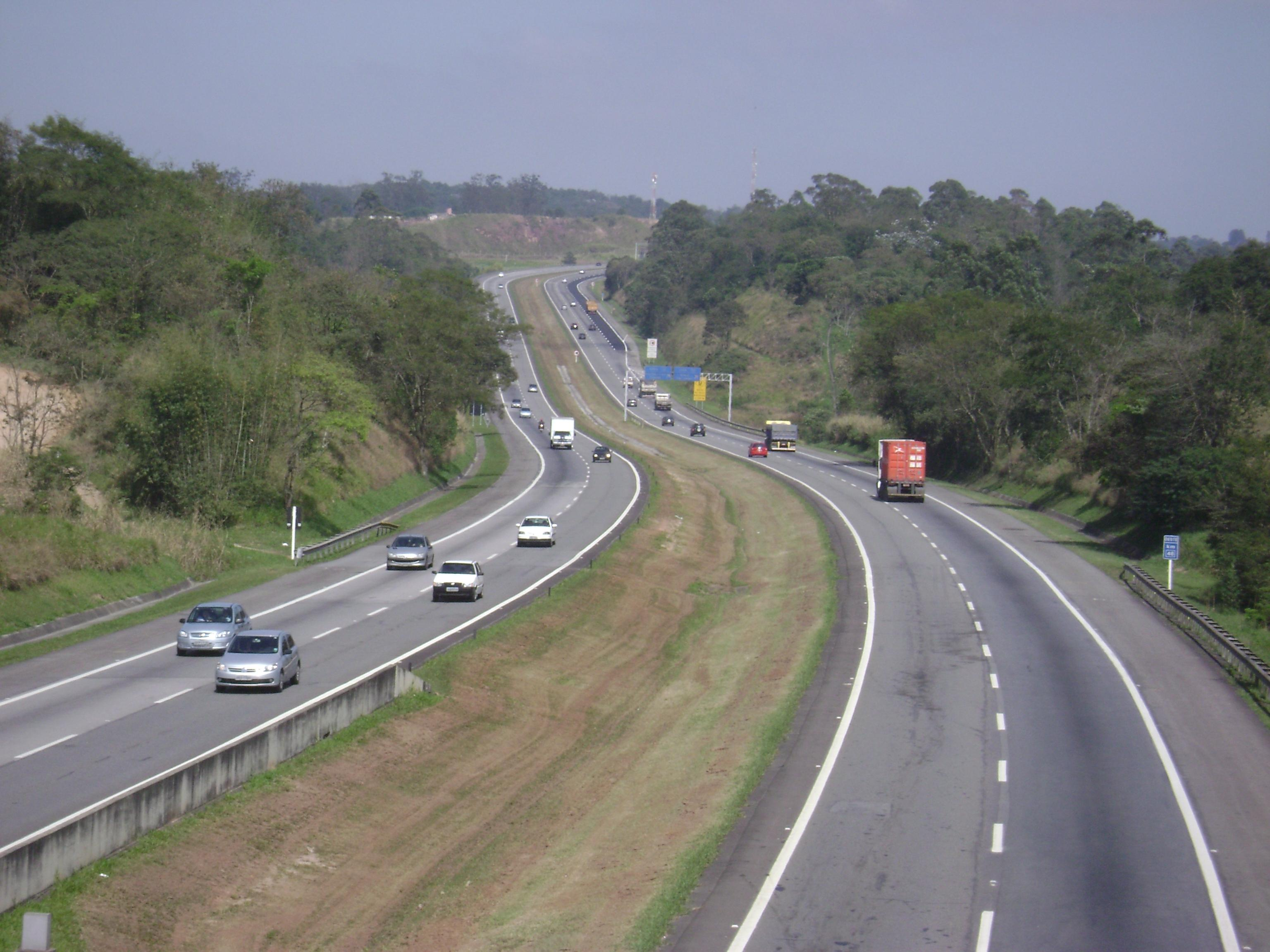 Rodovia Ayrton Senna (SP-70) sentido Capital, em Mogi das Cruzes.